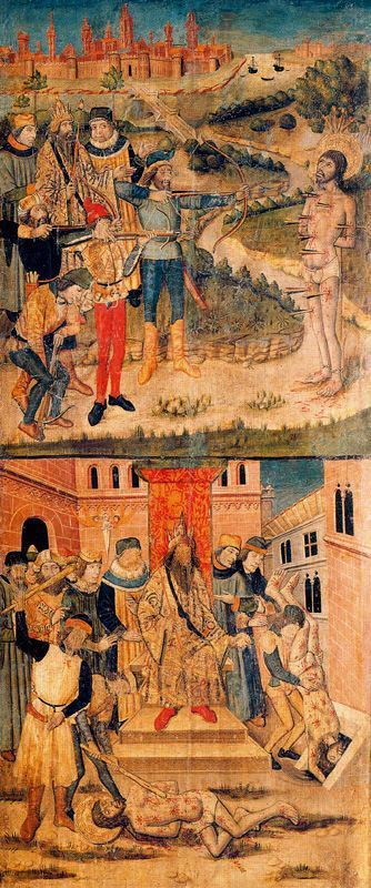 La obra representa, en la parte superior, el martirio de San Sebastián, y en la parte inferior, el martirio de San Policarpo, que aparece siendo apaleado ante el emperador Diocleciano y posteriormente arrojado a un pozo.